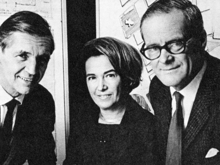 ETG-gruppen: från vänster Anders Tengbom, Léonie Geisendorf och Ralph Erskine